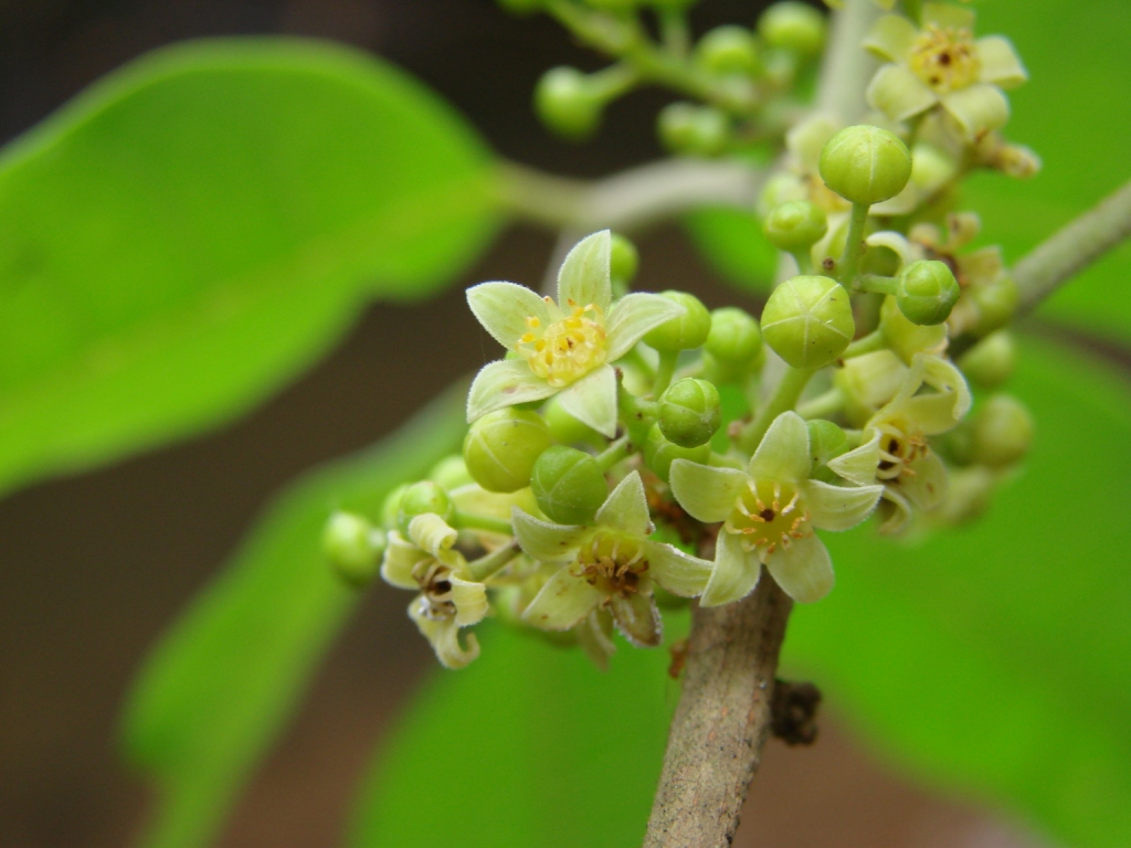 Protium spruceanum (Benth.) Engl. (Sin. het. Protium almecega Marchand) - BURSERACEAE - ARIE da Granja do Ipê - Brasília - Distrito Federal - Brasil.